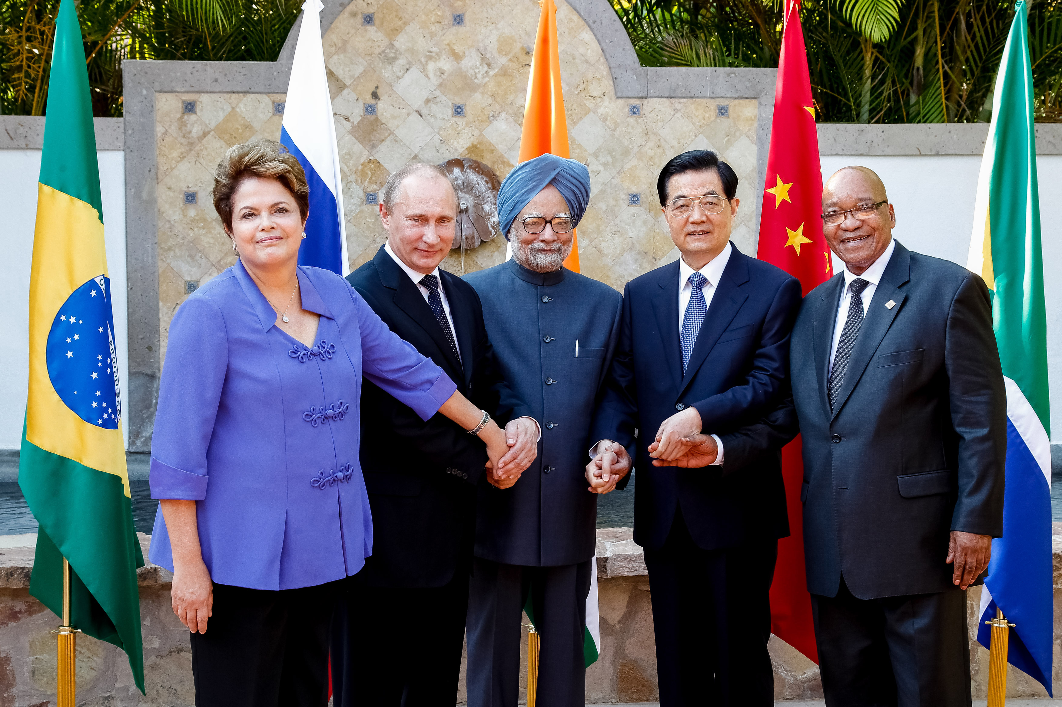 Presidenta Dilma Rousseff durante reunião dos Chefes de Estado e de Governo dos BRICS (Brasil, Rússia, Índia, China e África do Sul). Los Cabos - México, 18/06/2012 Foto: Roberto Stuckert Filho/PR